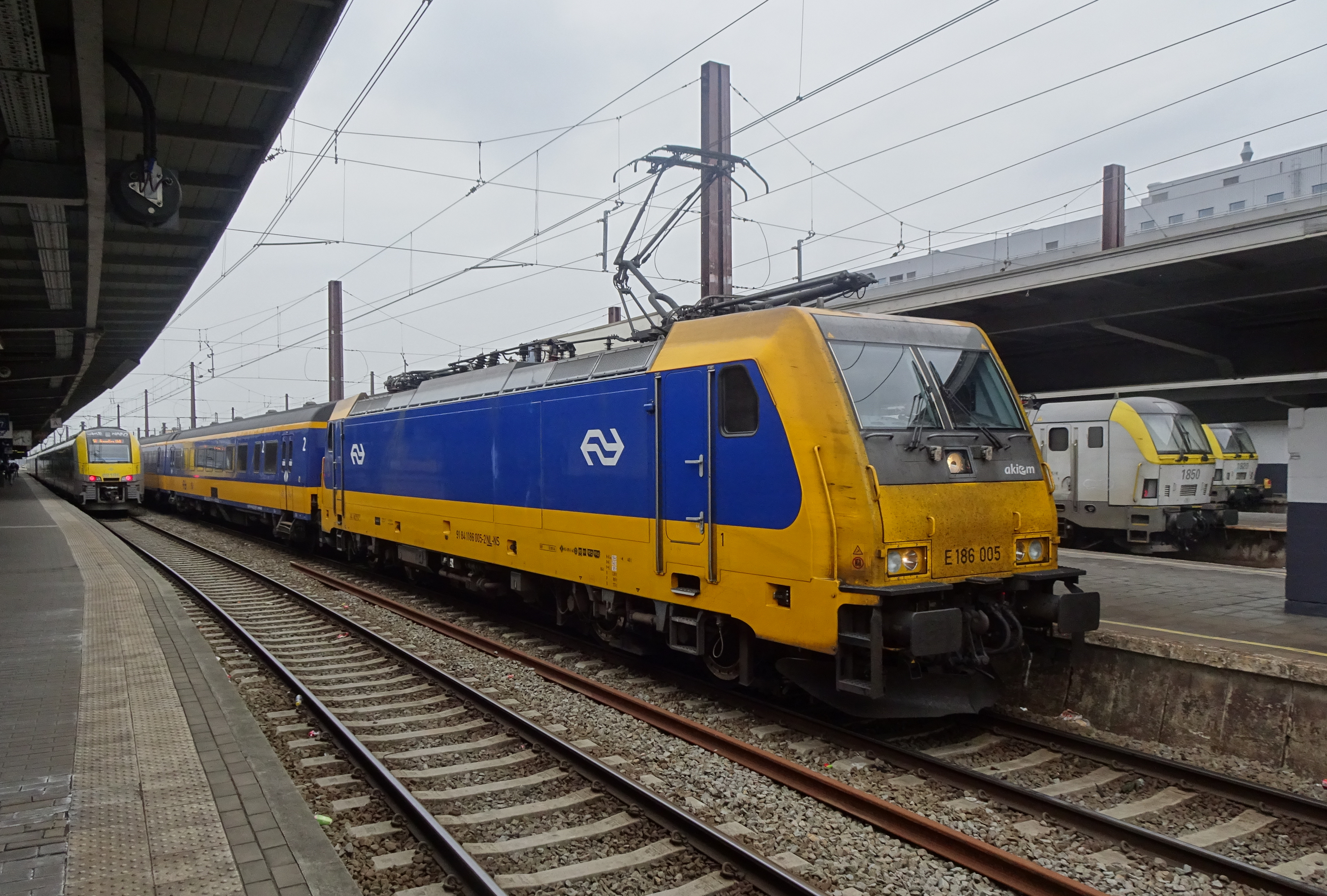 La locomotive E 186 005 attend le départ en gare de Bruxelles-Midi en tête d'un train Benelux.